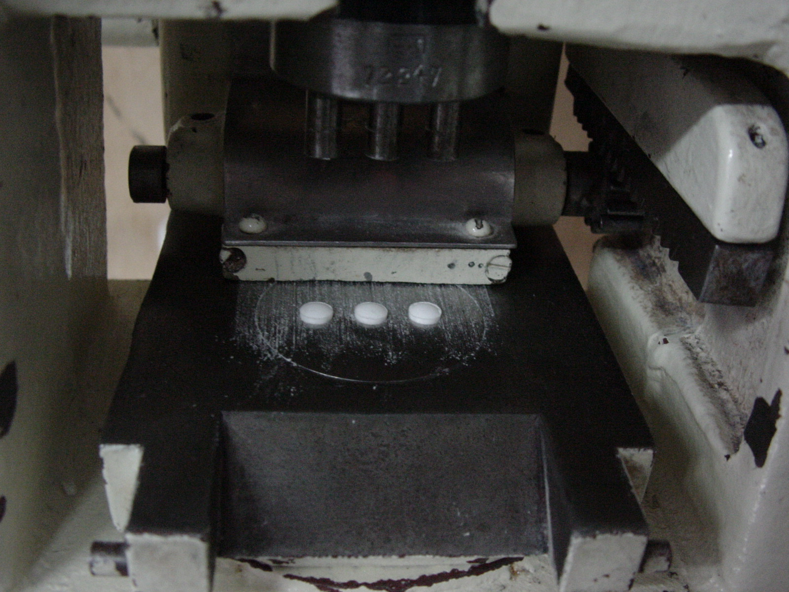 zdjęcie przedstawia tabletki wytłoczone w tabletkarce uderzeniowej w czasie zajęć dydaktycznych na Uniwersytecie Medycznym w Poznaniu.